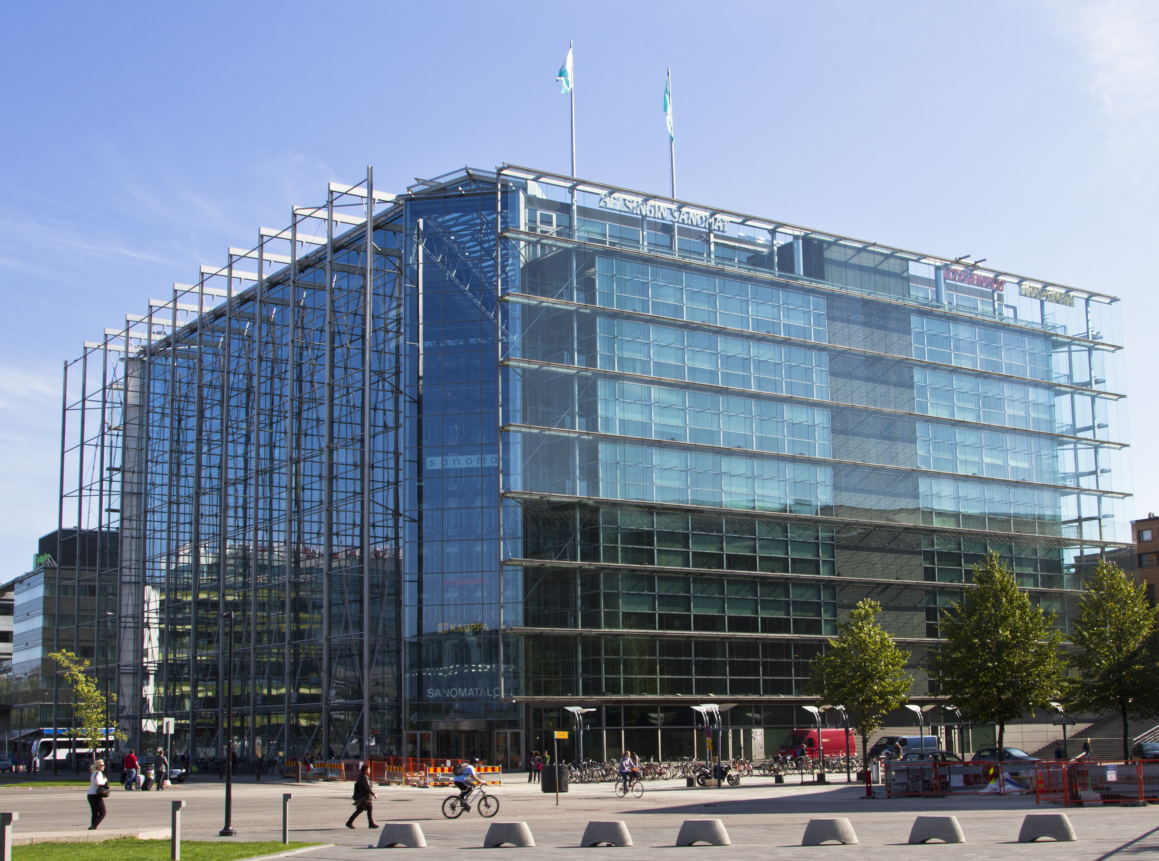 Sanomatalo.